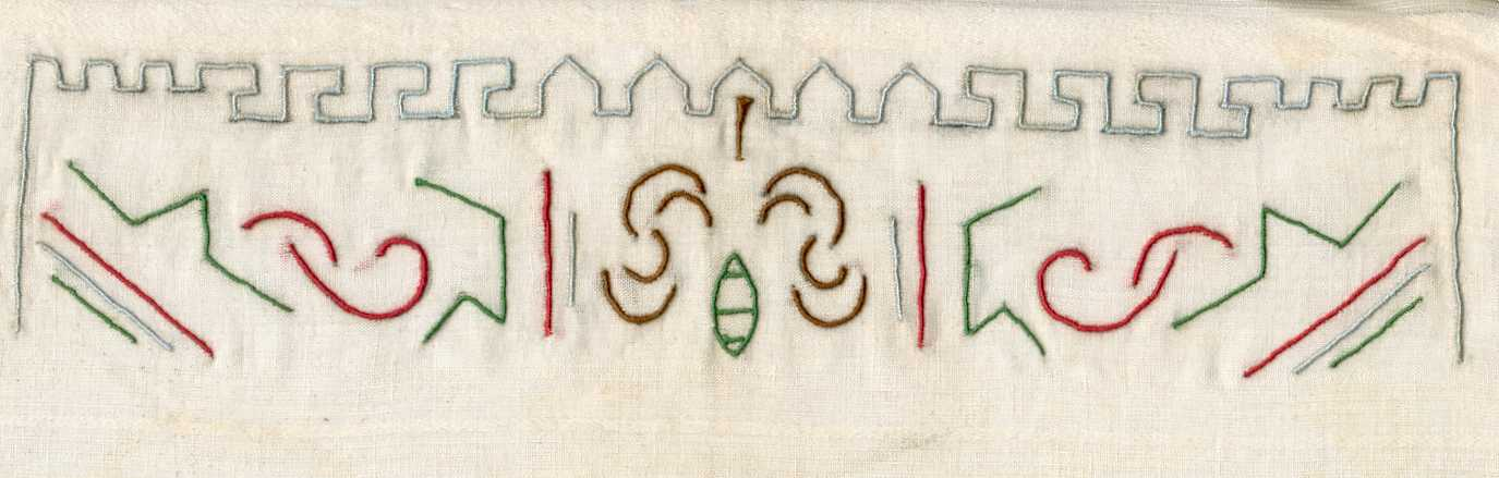 Décors de grecques au point de cordon. Colledction M.Peccaud